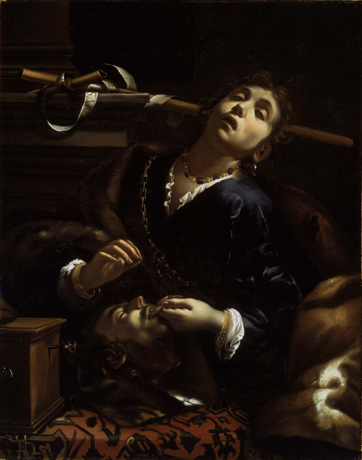 Herodías